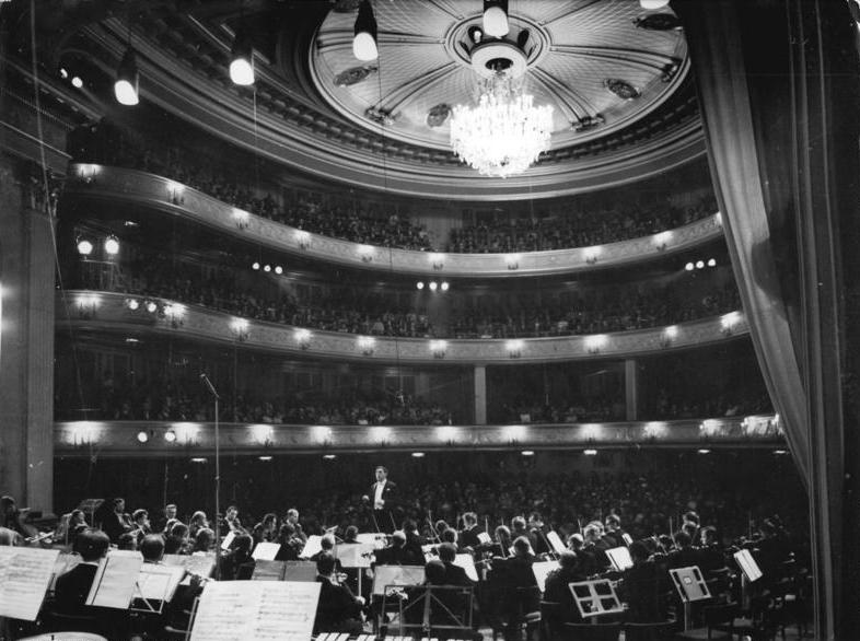 Zentralbild Franke 11.10.70 Berlin: Festtage - 400 Jahre Staatskapelle-Mit einem Festkonzert in der Deutschen Staatsoper beging am 16.10.70 die Berliner Staatskapelle den 400. Jahrestag ihrer Gründung. In dem Jubiläumskonzert erklangen unter der Leitung des Chefdirigenten Prof. Otmar Suitner Werke von Beethoven, Richard Strauß, Dezsau und Schubert.